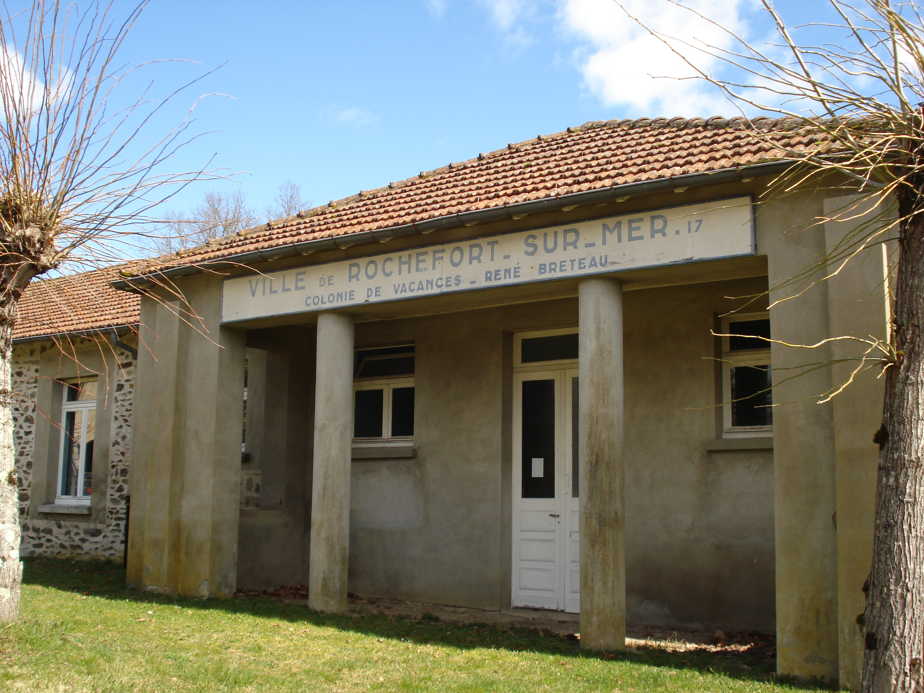 La façade de l'ancienne colonie de Rochefort/Mer à Lapleau en Corrèze